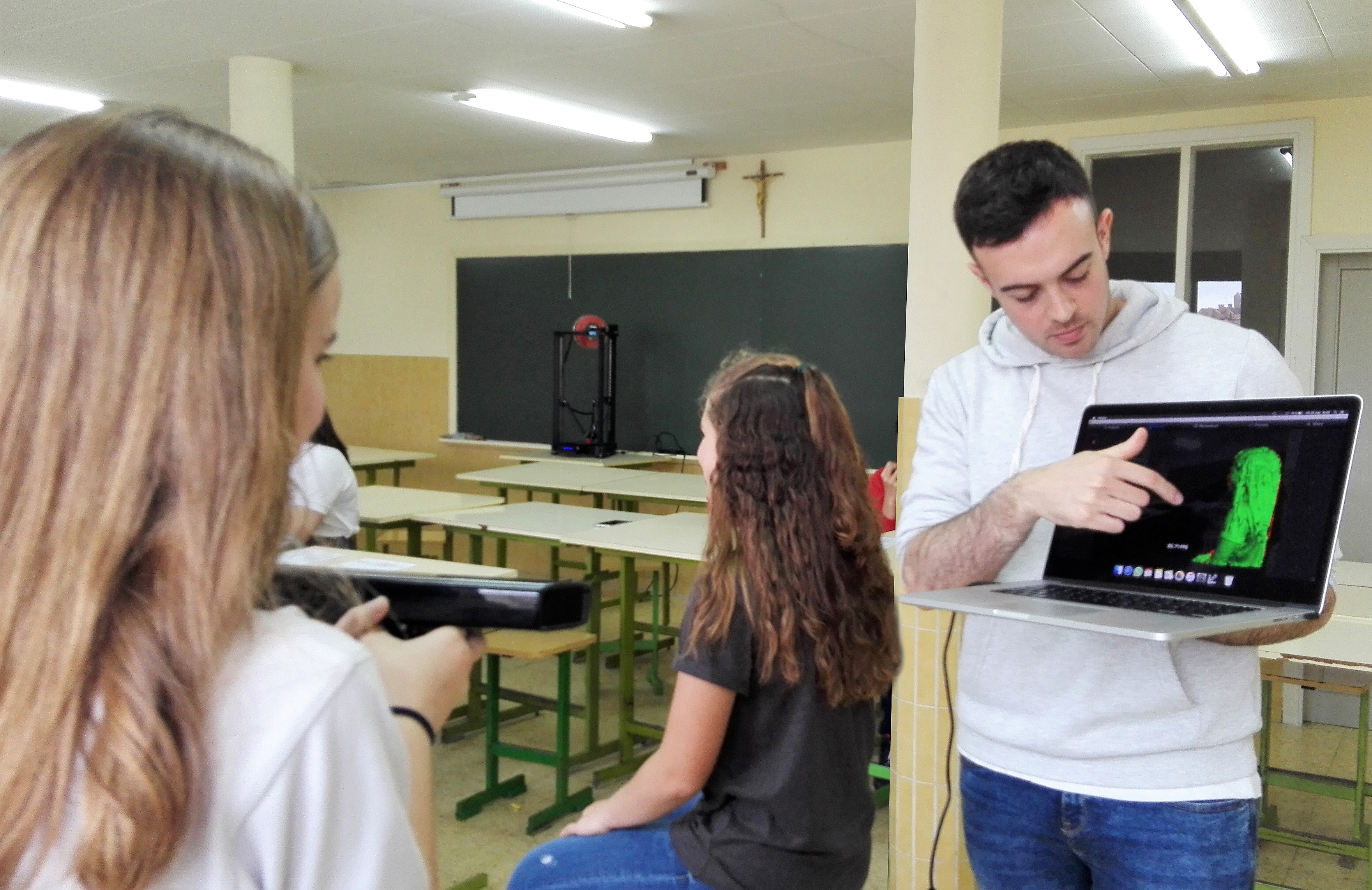 Taller Escultura 4.0